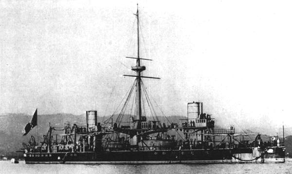 Corazzata Duilio 1880